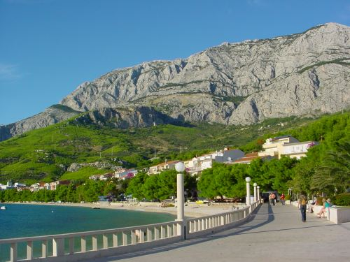 Tucepi mit Biokovo-Massiv